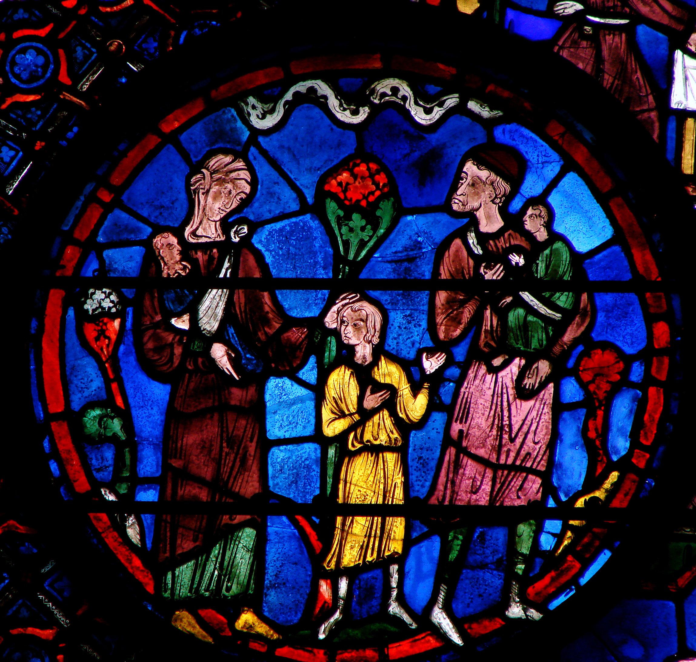 Détail d'un vitrail de la cathédrale Notre-Dame de Chartres.